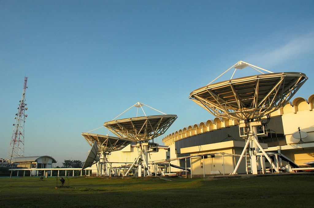 stasiun bumi jatiluhur pada pagi hari